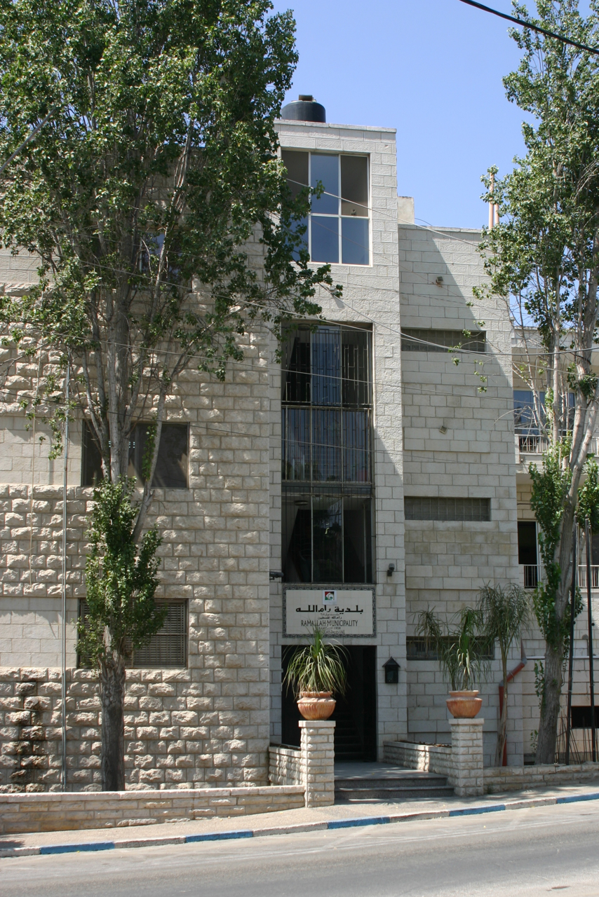 Die Stadtverwaltung von Ramallah in Palästina. Object location31° 54′ 07″ N, 35° 12′ 00″ E